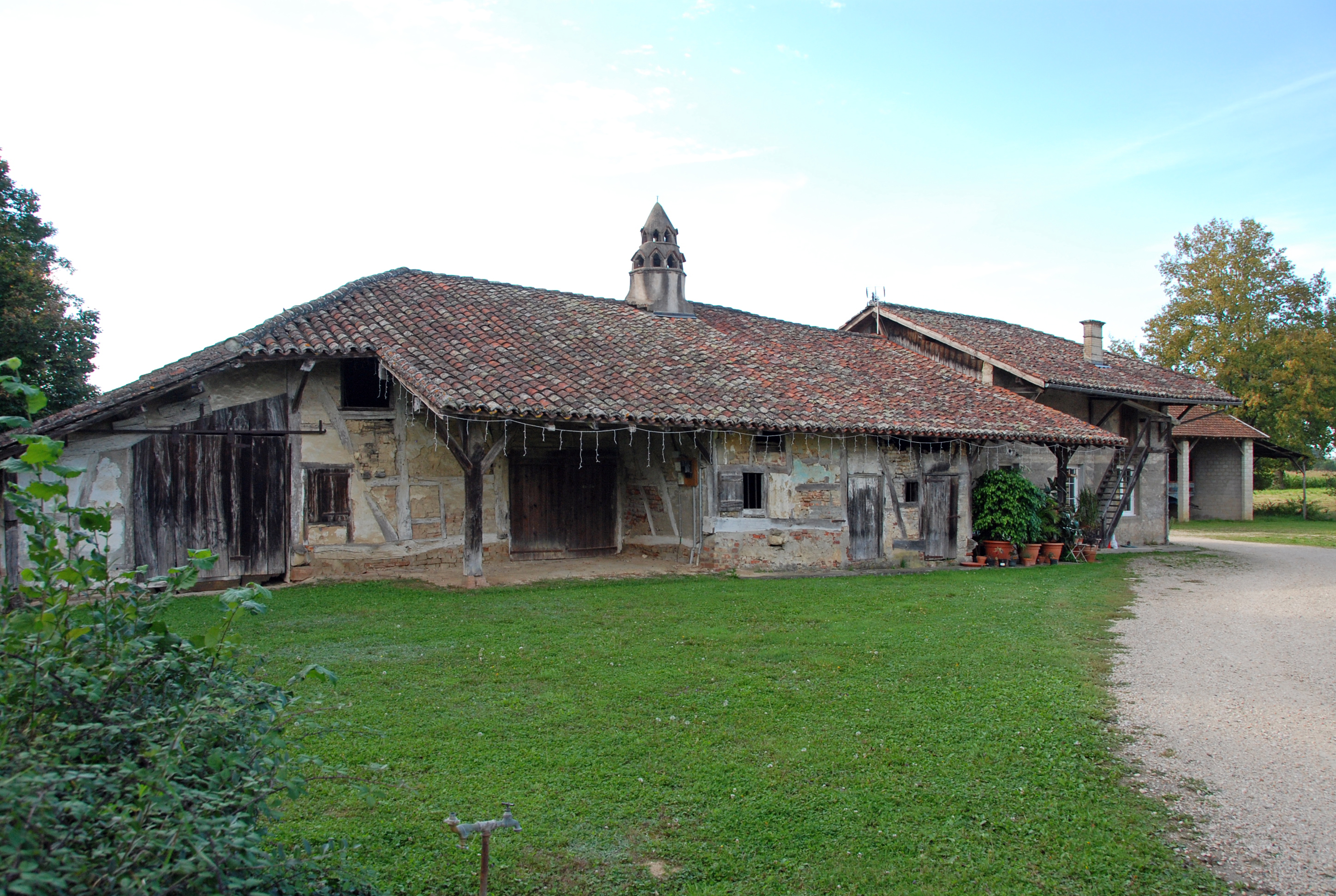 Ferme de Cossiat, Cossiat (Inscrit, 1925) .